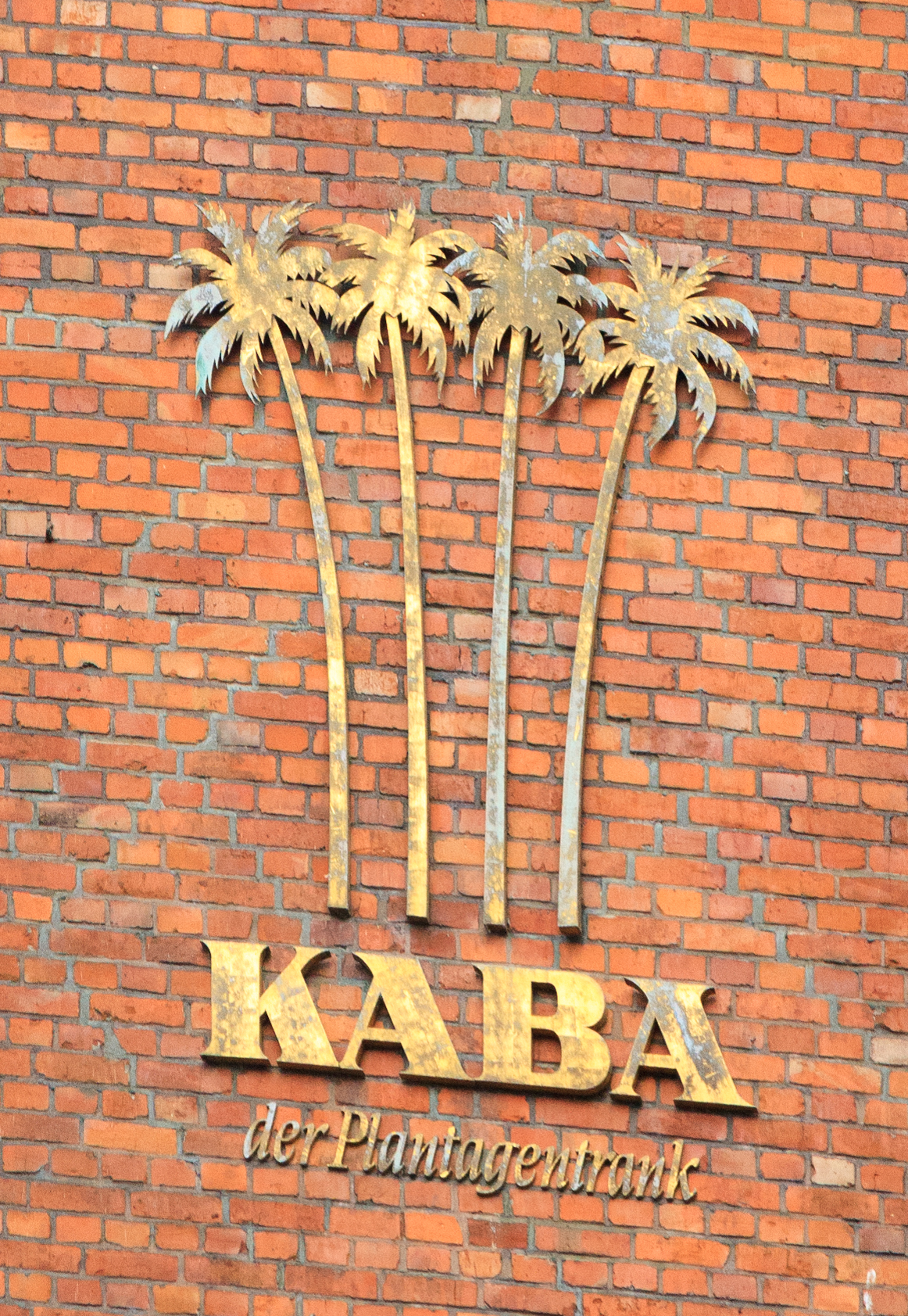 Logo am Gebäude des ehemaligen Kaba-Werks in Bremen